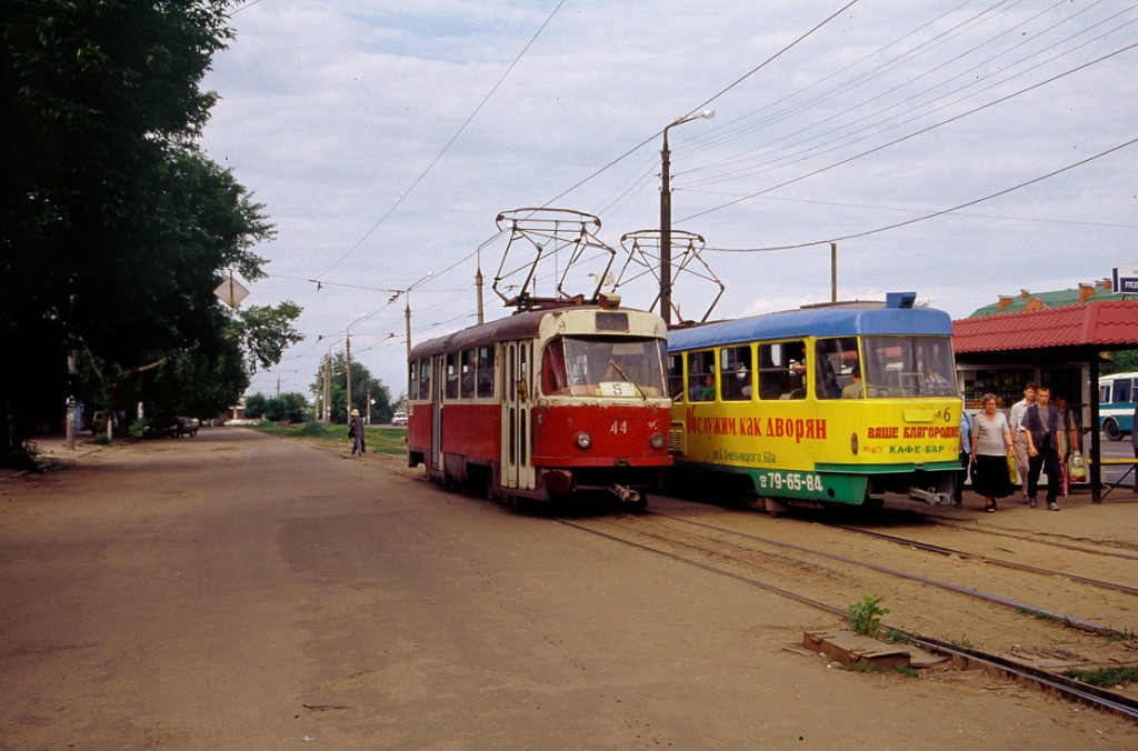 Трамваи Татра на улице Ленина